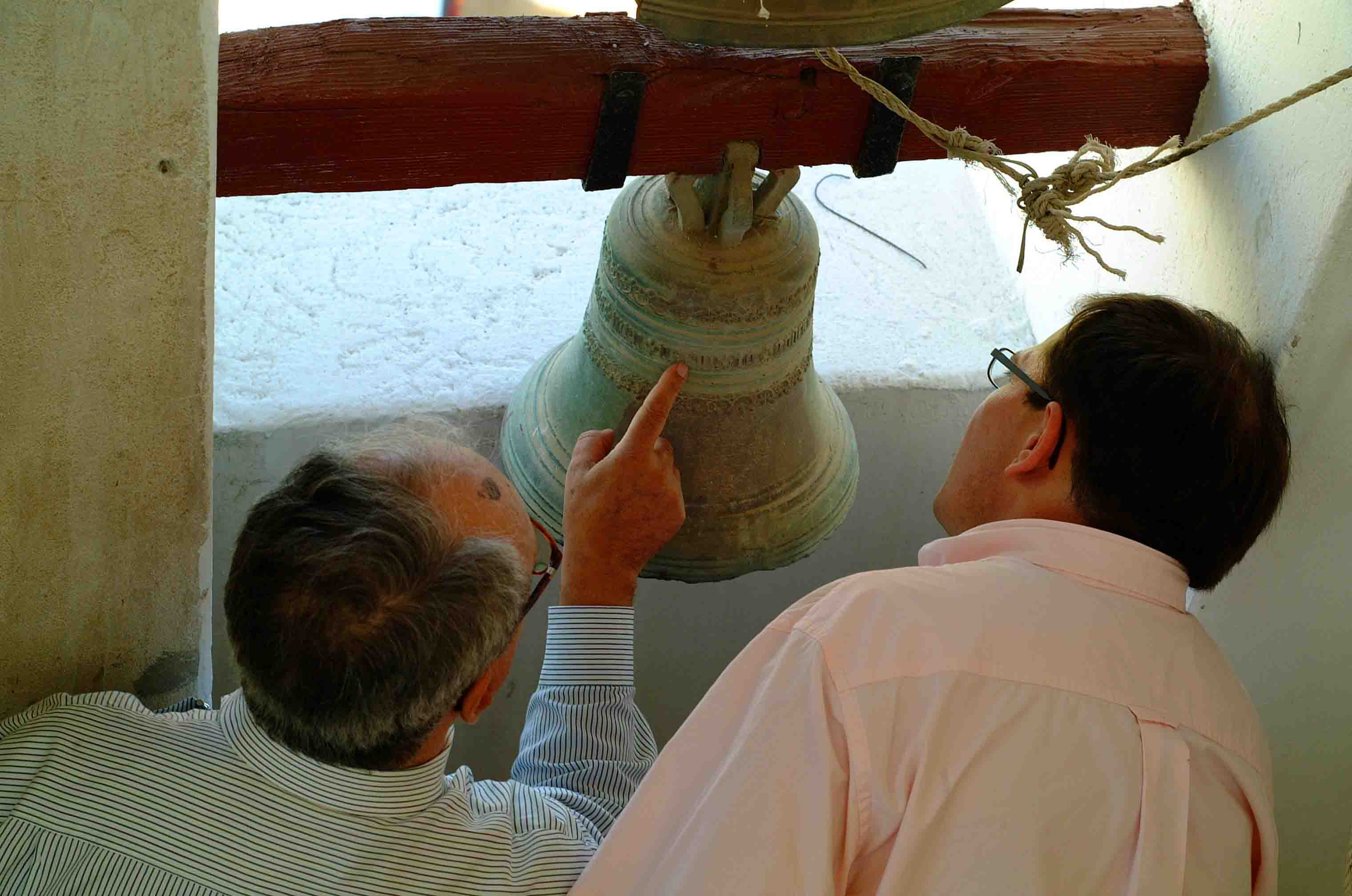 Inventário de sinos históricos (Grândola).